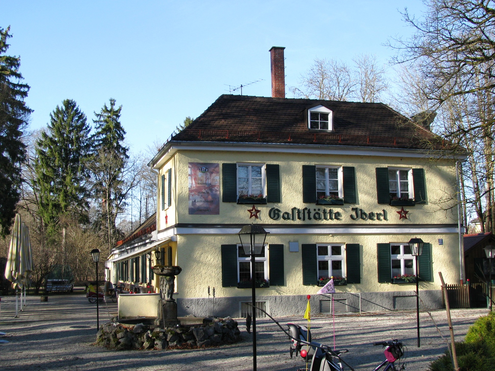 Gaststätte Iberl mit der Iberl-Bühne im Münchner Stadtteil Solln